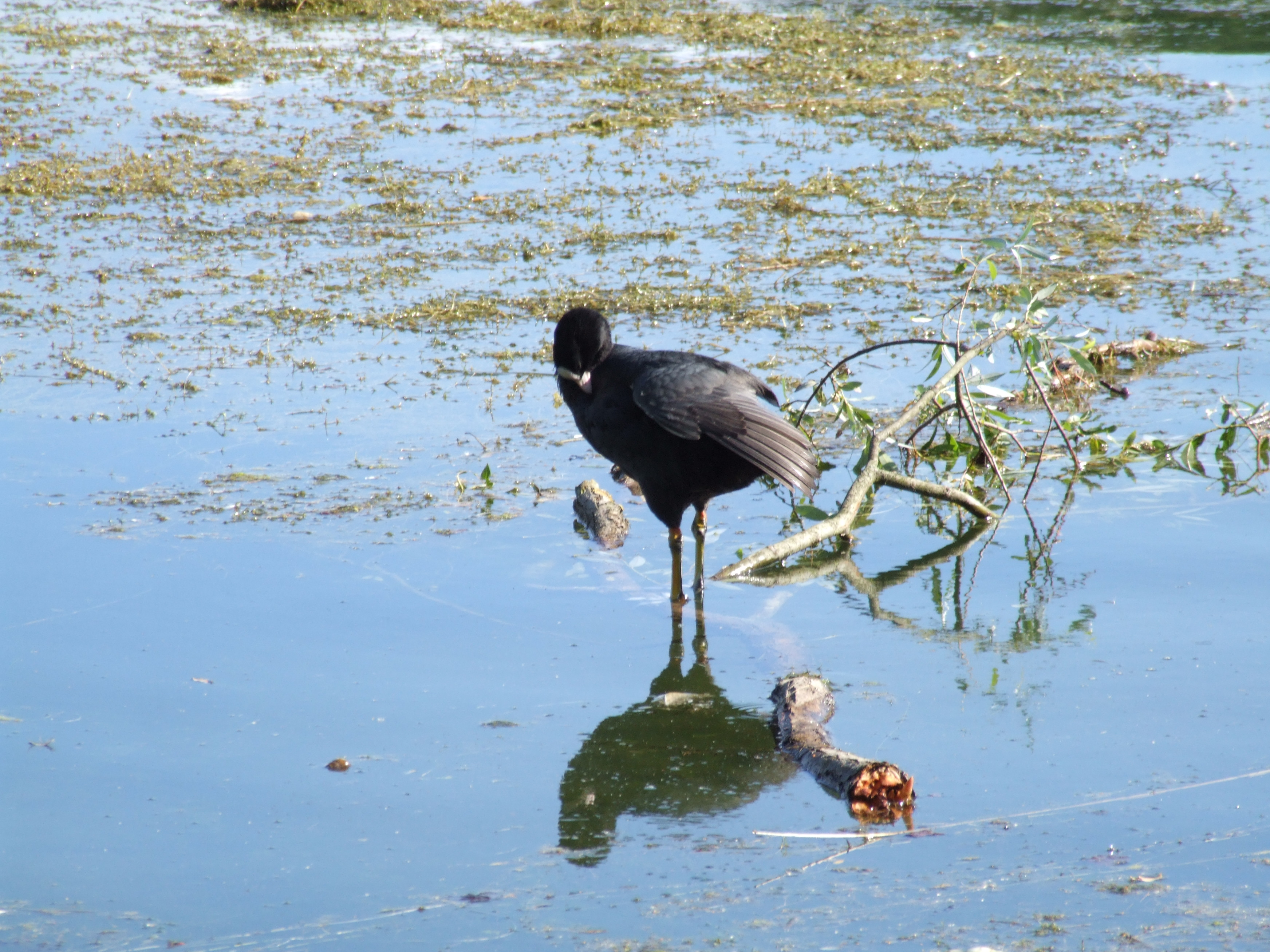 Angelhofer Altrhein - nördlicher Bereich mit Campingplatz und Bootsliegeplätzen - Wasservogel im Flachwasser